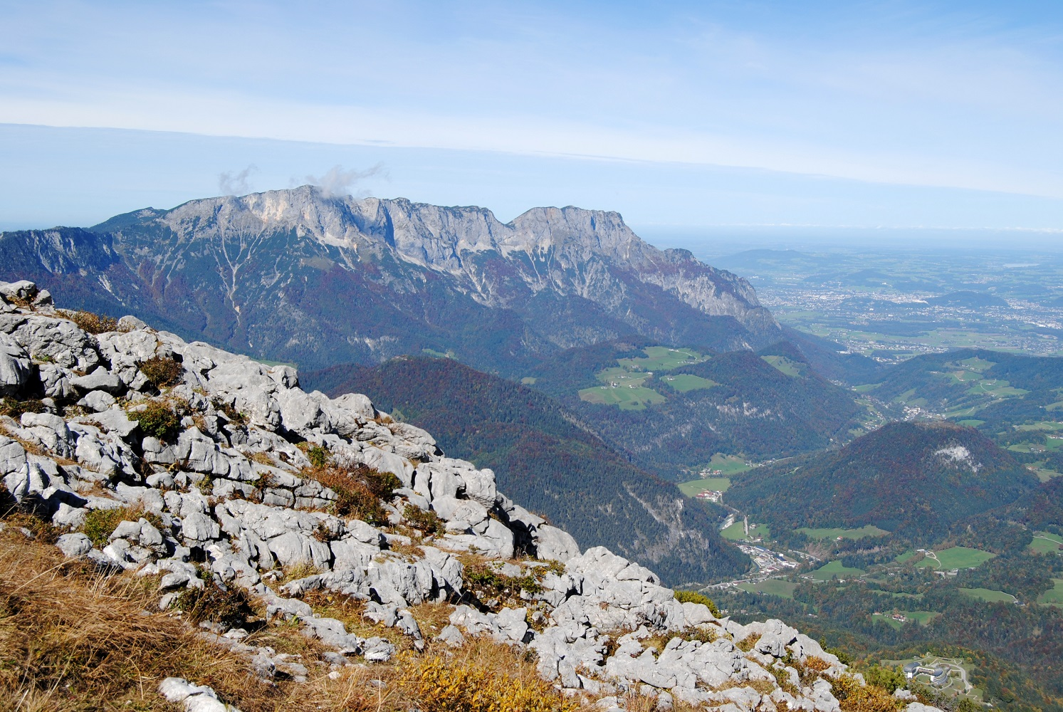 Bavarijos alpės